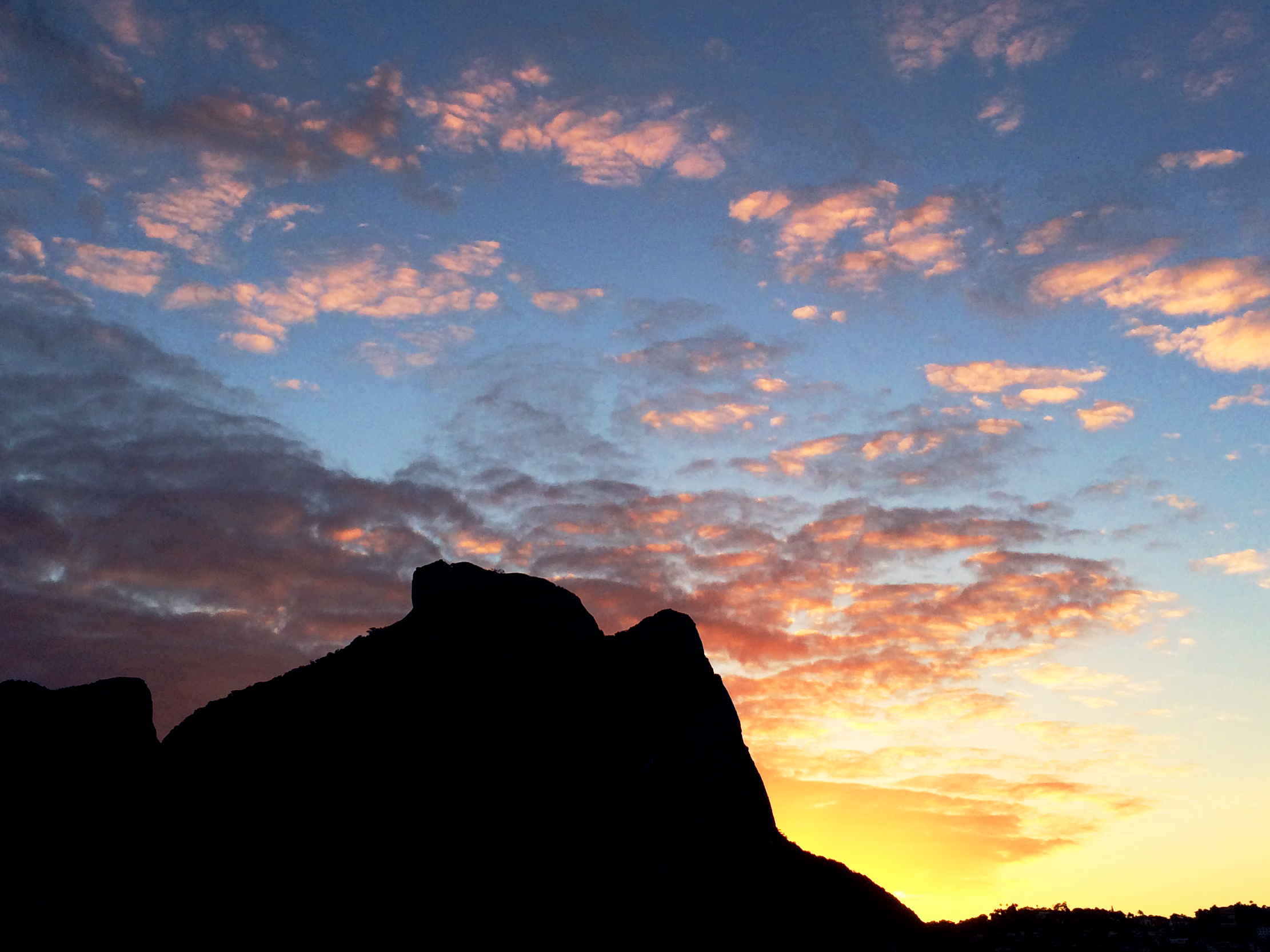 Pedra da Gávea vista da Praia da Barra, Rio de Janeiro.